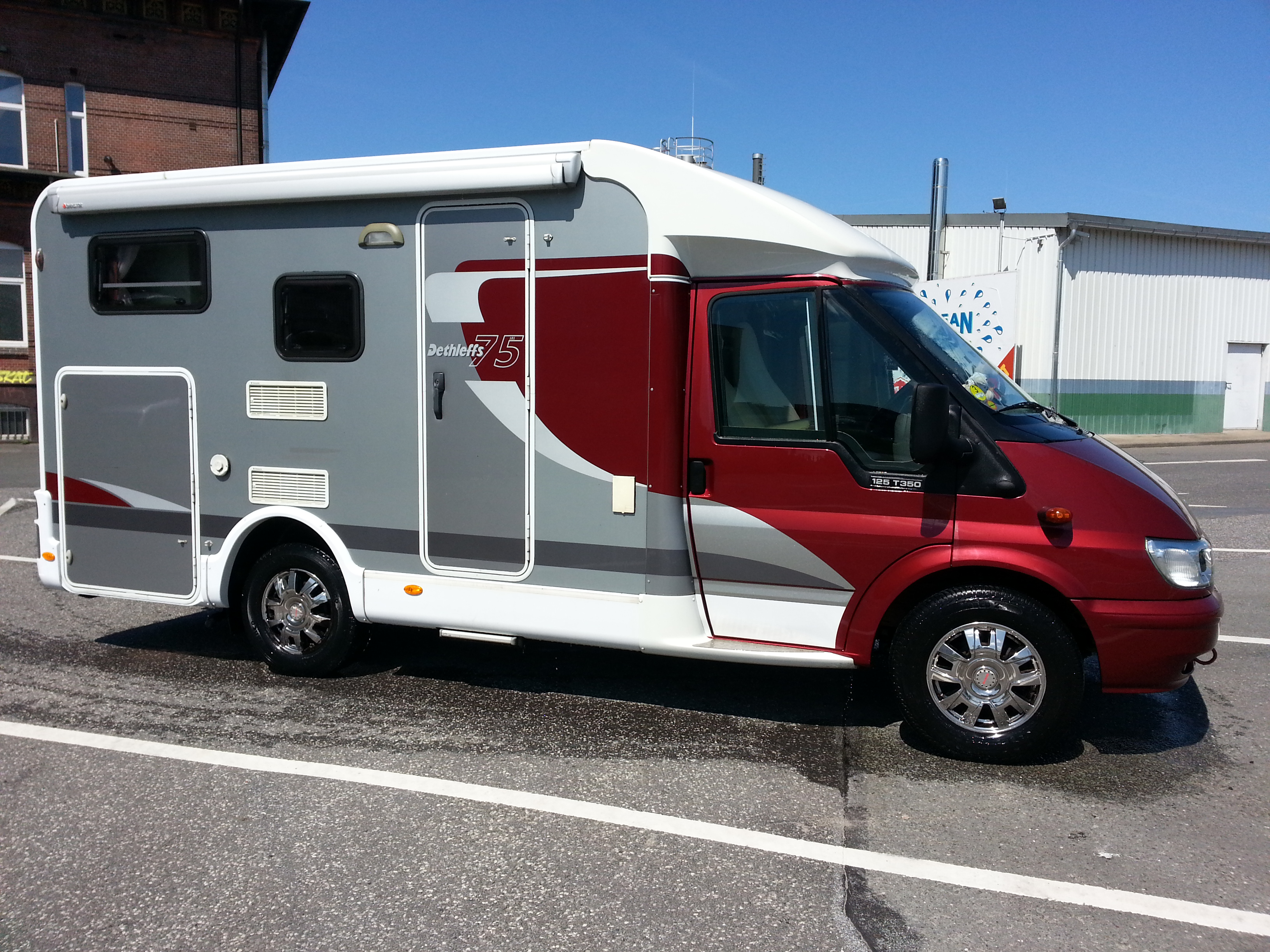 Globevan 01, Baujahr 2006